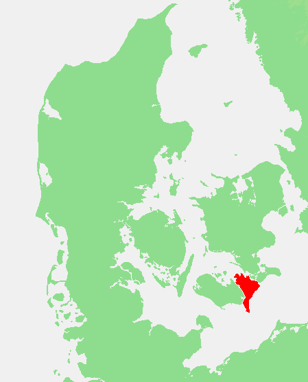 DK - Falster.PNG